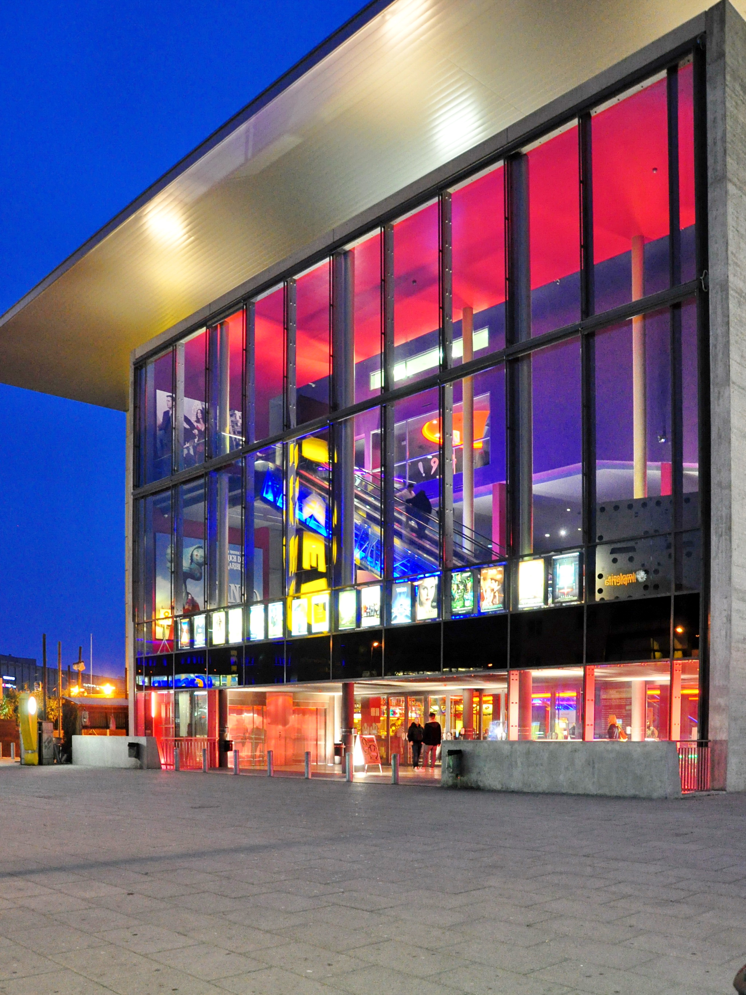 Pathé in Dietlikon (Switzerland)